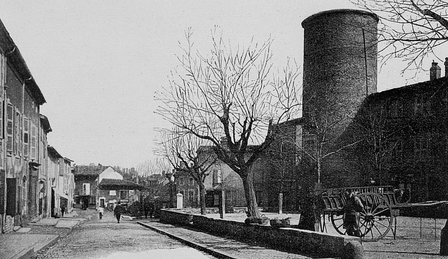 Dictionnaire illustré des communes du département du Rhône. Tome 1 / par MM. E. de Rolland et D. Clouzet.